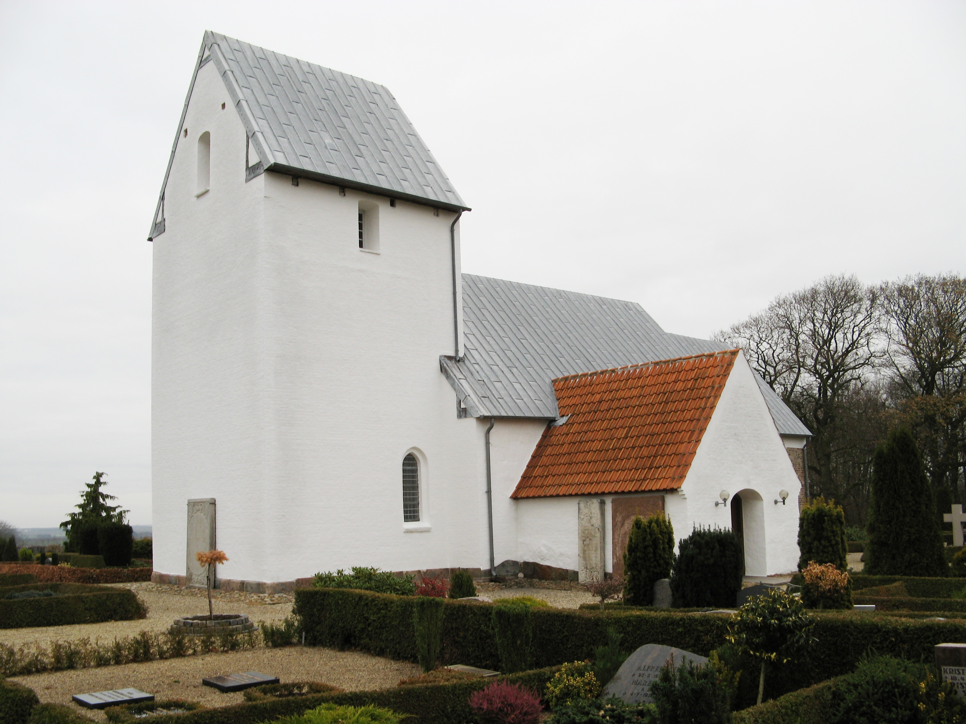 Årre kirke, Årre sogn, Varde kommune (former: Skads Herred, Ribe Amt). Kirken set fra sydvest